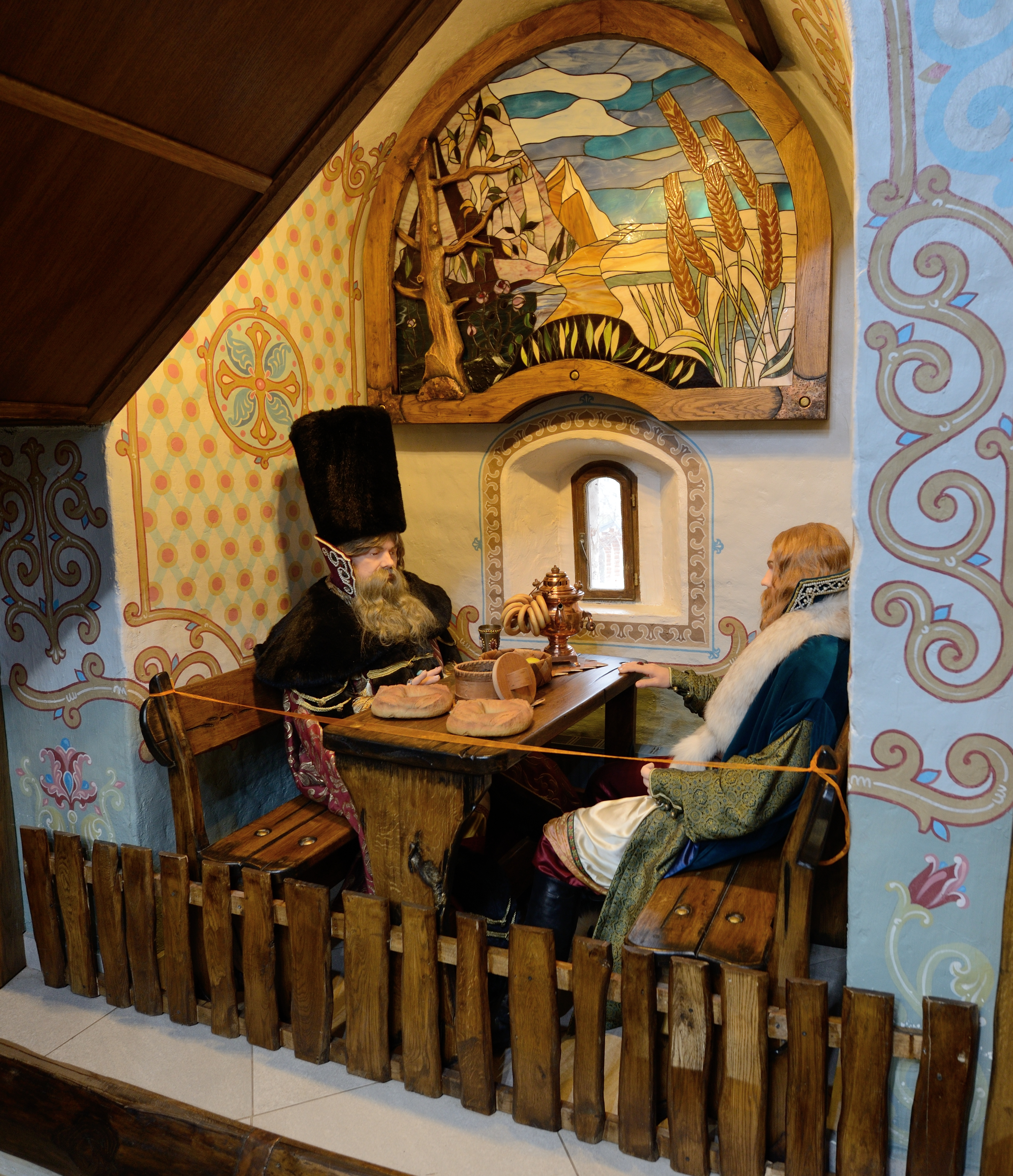 Фрагмент оформления Провиантской башни Въезд на территорию Саввино-Сторожевского Ставропигиального мужского монастыря